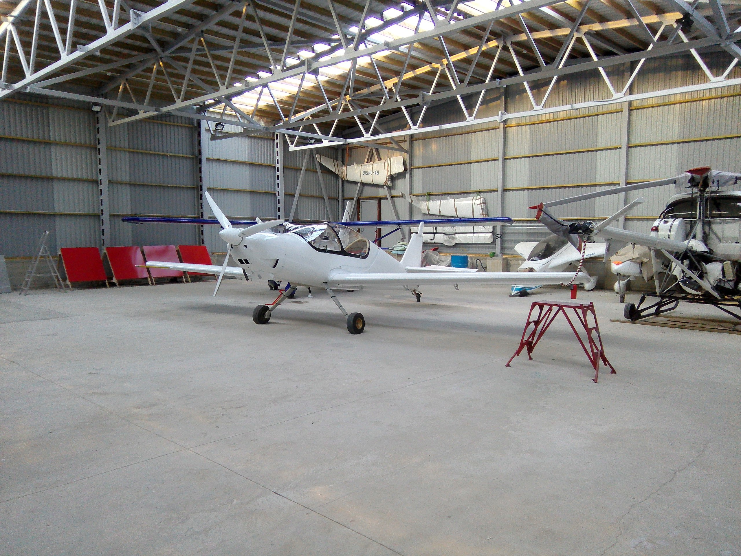 А-41 в ангаре